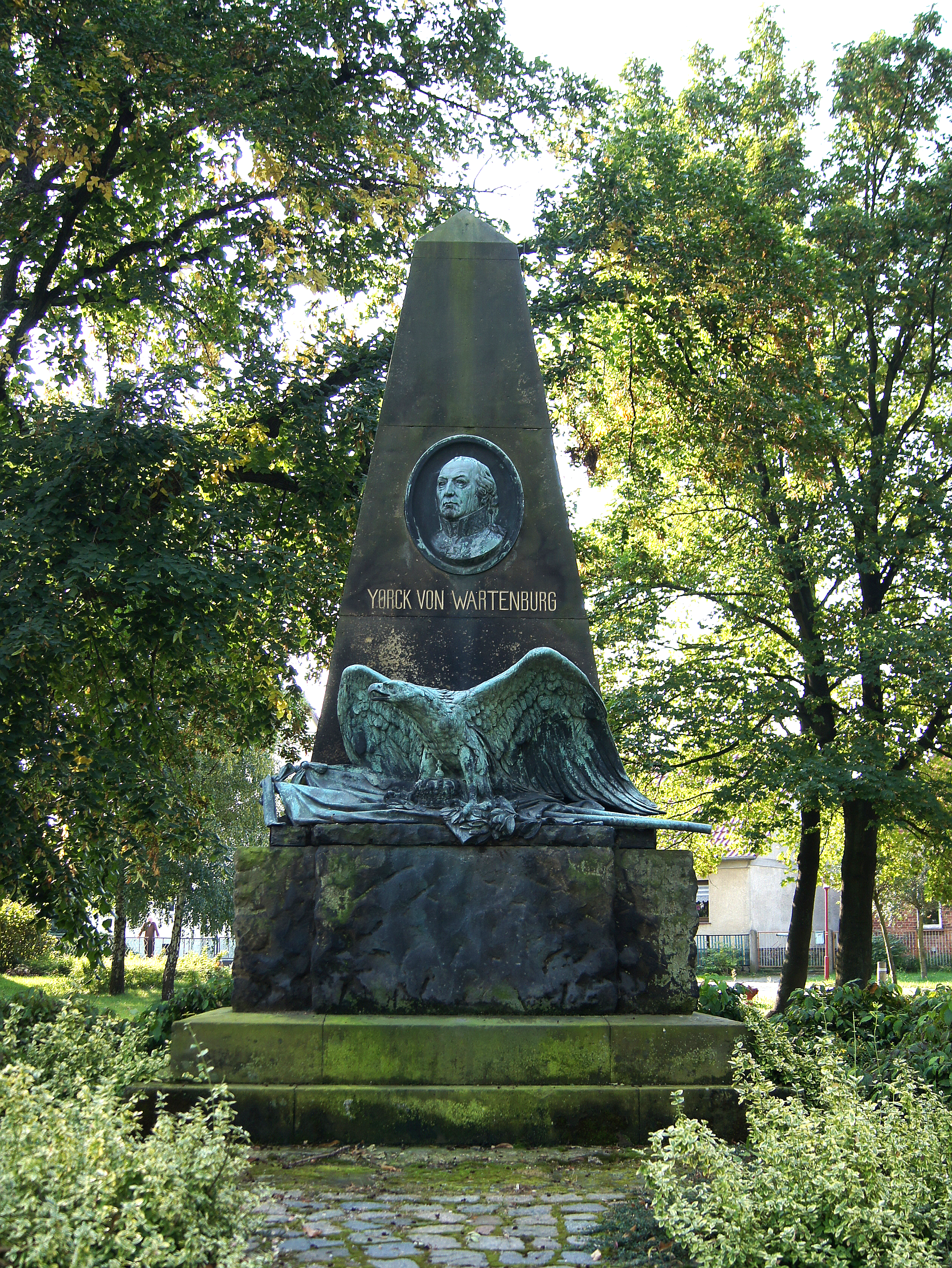 Denkmal für den preußischen General Yorck von Wartenburg Yorckring, Wartenburg, Stadt Kemberg, Landkreis Wittenberg, Sachsen-Anhalt